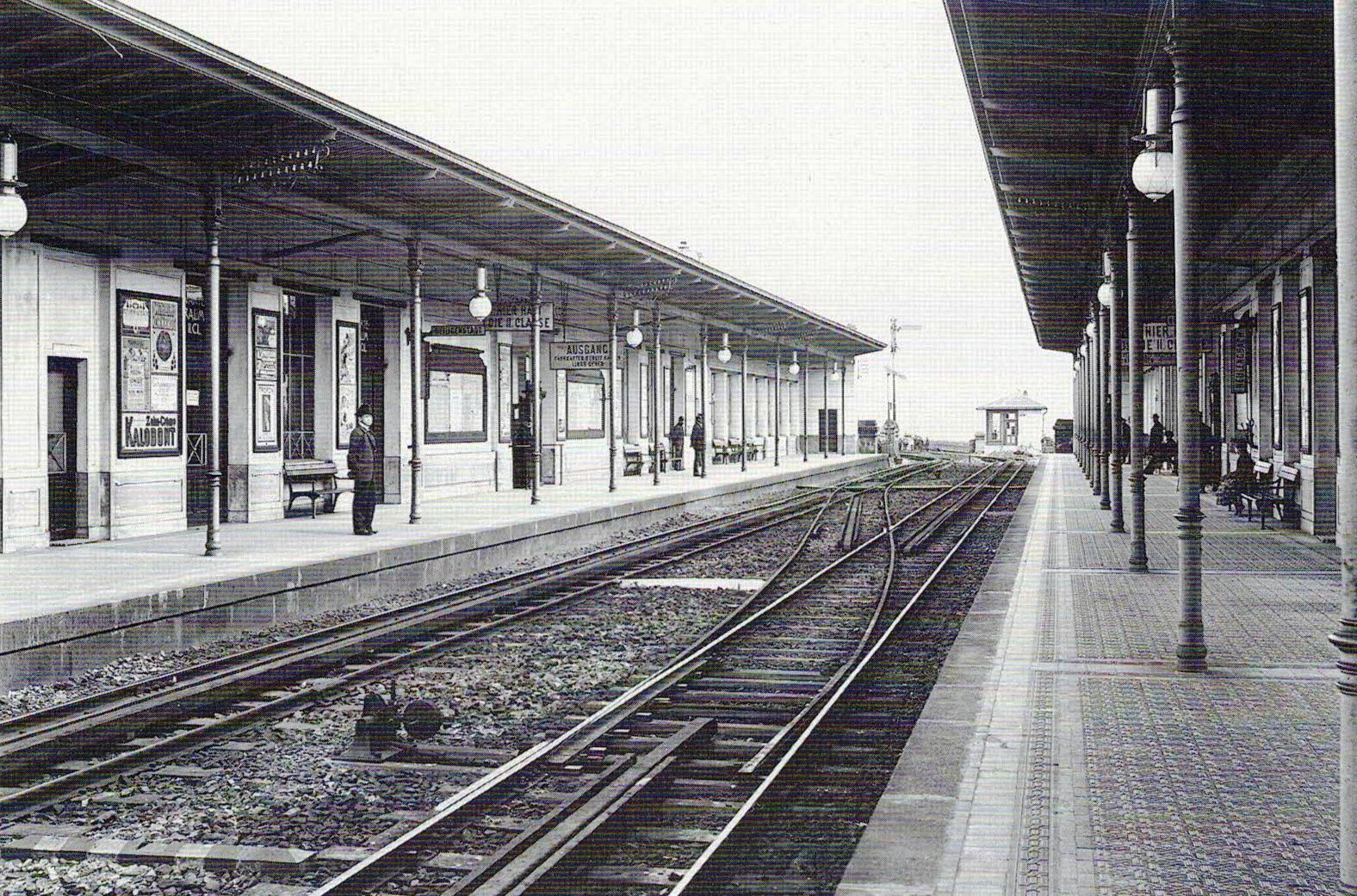 Station Nußdorfer Straße (1901), Werkfoto von Siemens & Halske